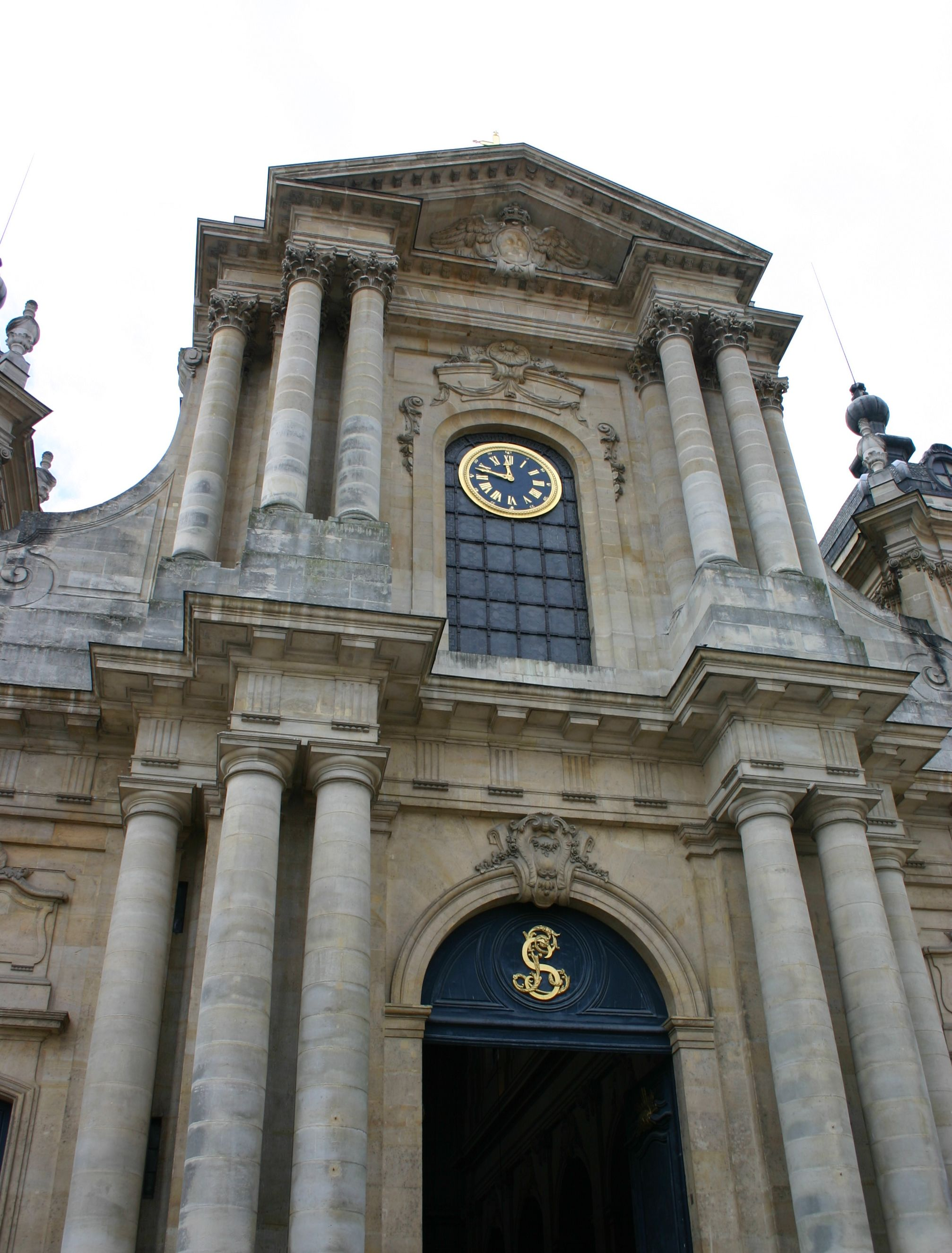 Façade de la Cathédrale St Louis de Versailles (Yvelines)